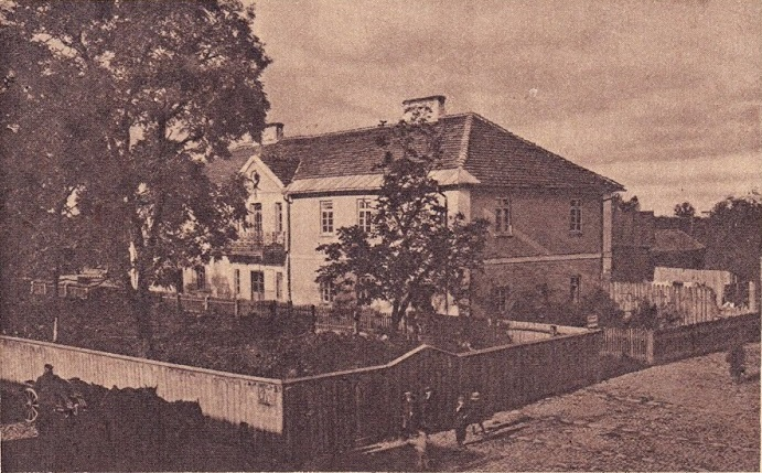 Budynek starostwa w Wysokie Mazowieckiem w latach 1918-1939 r. zlokalizowany w Rynku. Władze powiatowe umieszczono w wynajętym budynku w Rynku u wylotu ulicy Mystkowskiej.